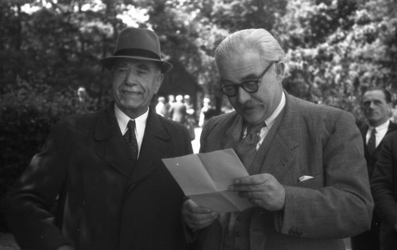 Ministerpräsidenten-Konferenz der Länder der 3 Westzonen Deutschlands auf dem Berghotel Rittersturz in Koblenz (v.l.n.r.: Karl Friedrich Zörgiebel, Dr. Hinrich Kopf) 8.-10.7.1948